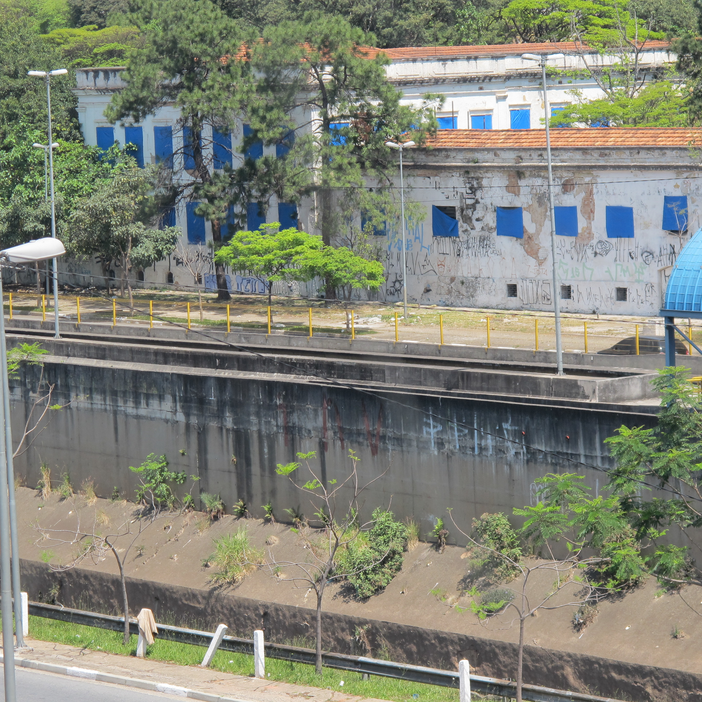 Quartel do Segundo Batalhão de Guardas visto da plataforma de embarque da estação de metrô Pedro II no sentido "Corinthians-Itaquera" da linha vermelha. A estação e o quartel se encontram na Avenida do Estado em São Paulo, SP, Brasil.